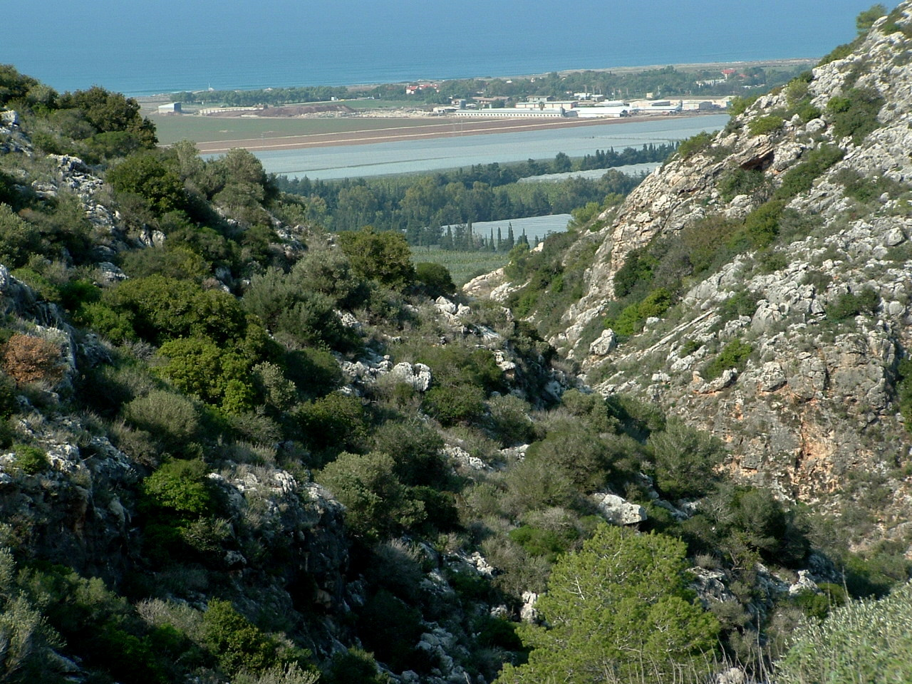 View from Sfunim Wadi - Mount Carmel Israel, Part of Carmel National Park מראות, נוף ומערות בנחל ספונים בהר הכרמל. הנחל הינו חלק מפארק הכרמל. הנחל שימש להתיישבות בתקופות הפרהיסטוריות. שרידים נמצאו בחפירות ארכאולוגיות בנחל ובמערות, כגון מערת ספונים